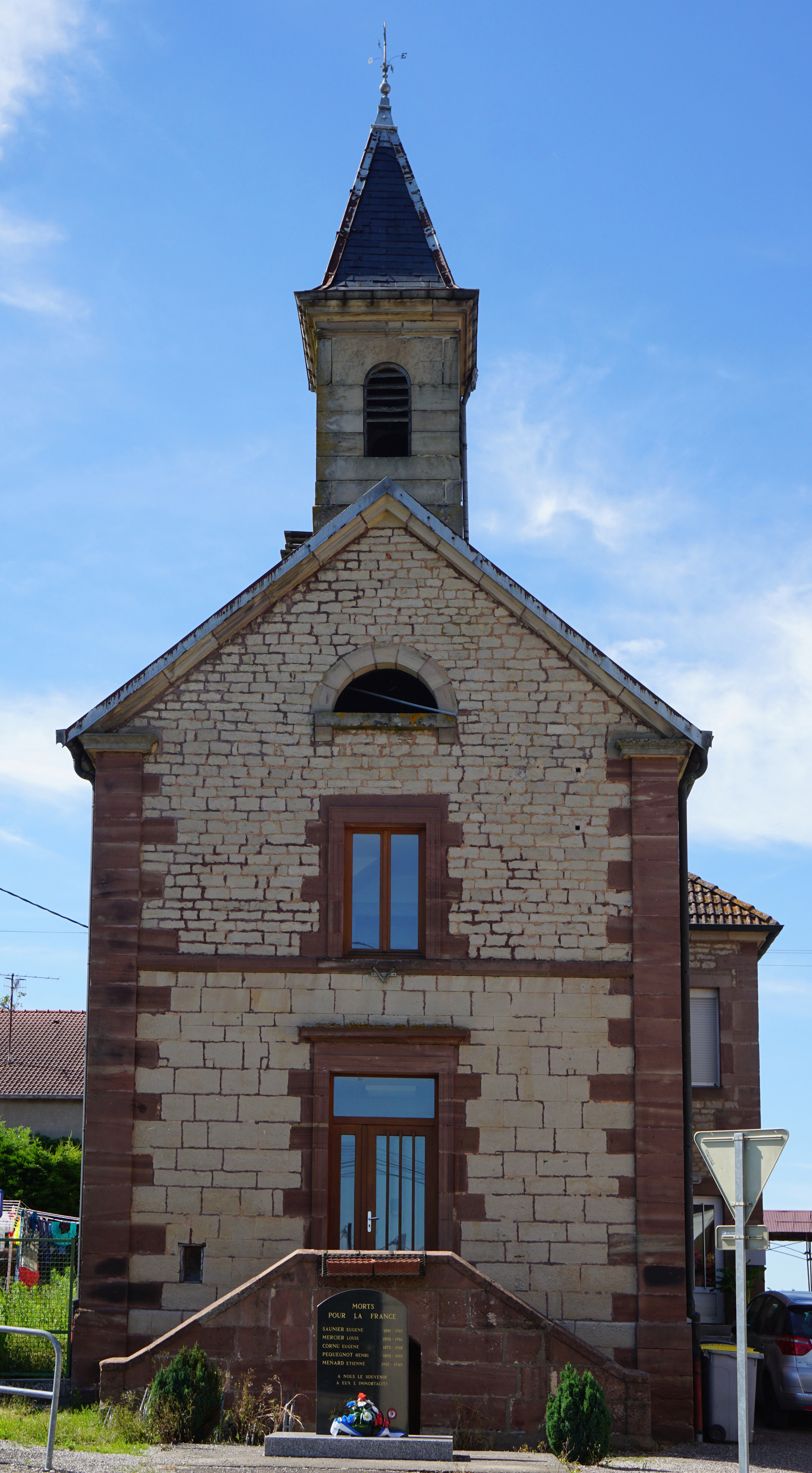 Mairie de Villargent.